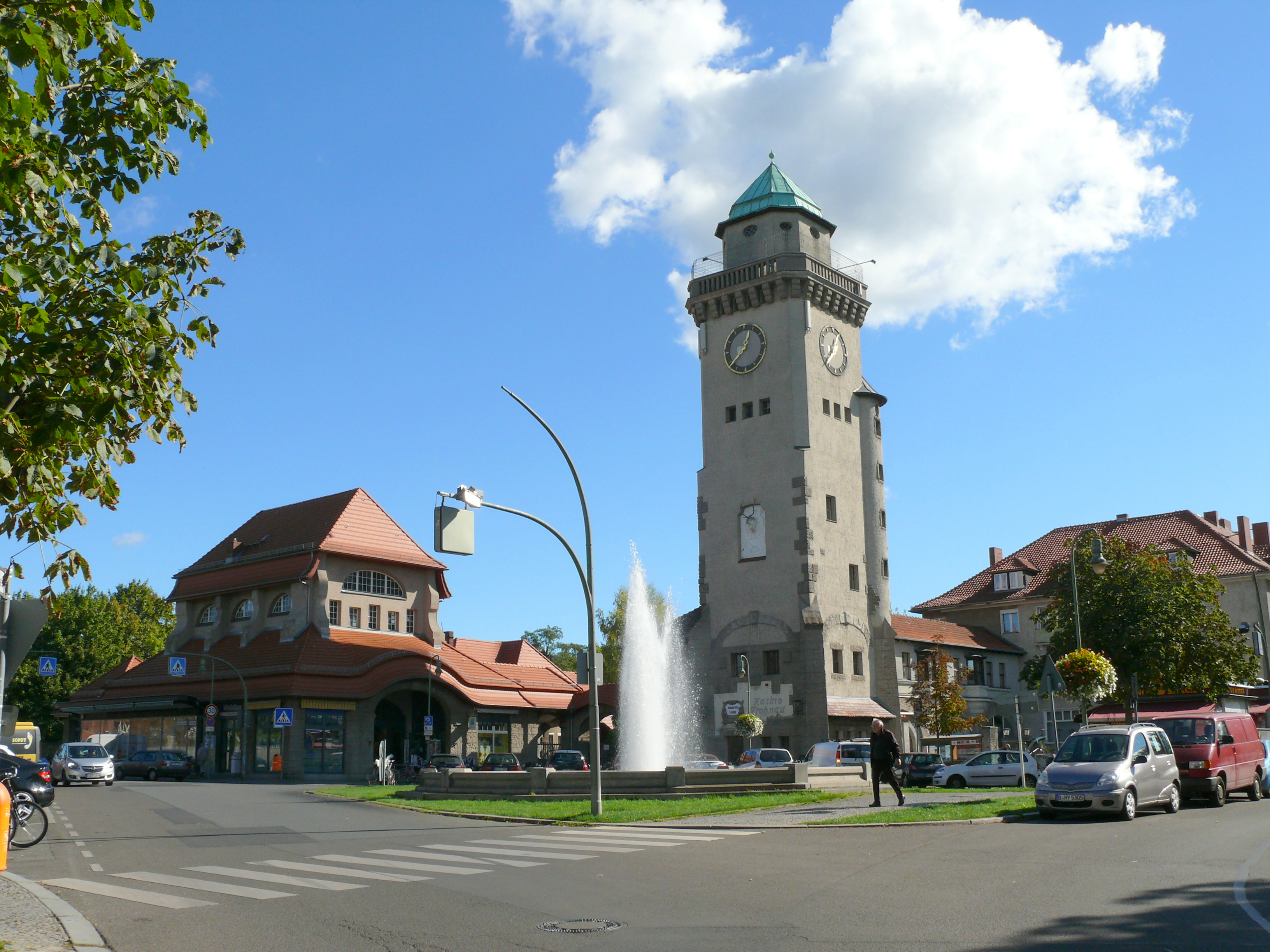 Frohnau Ludolfingerplatz S-Bahnhof mit Kasinoturm